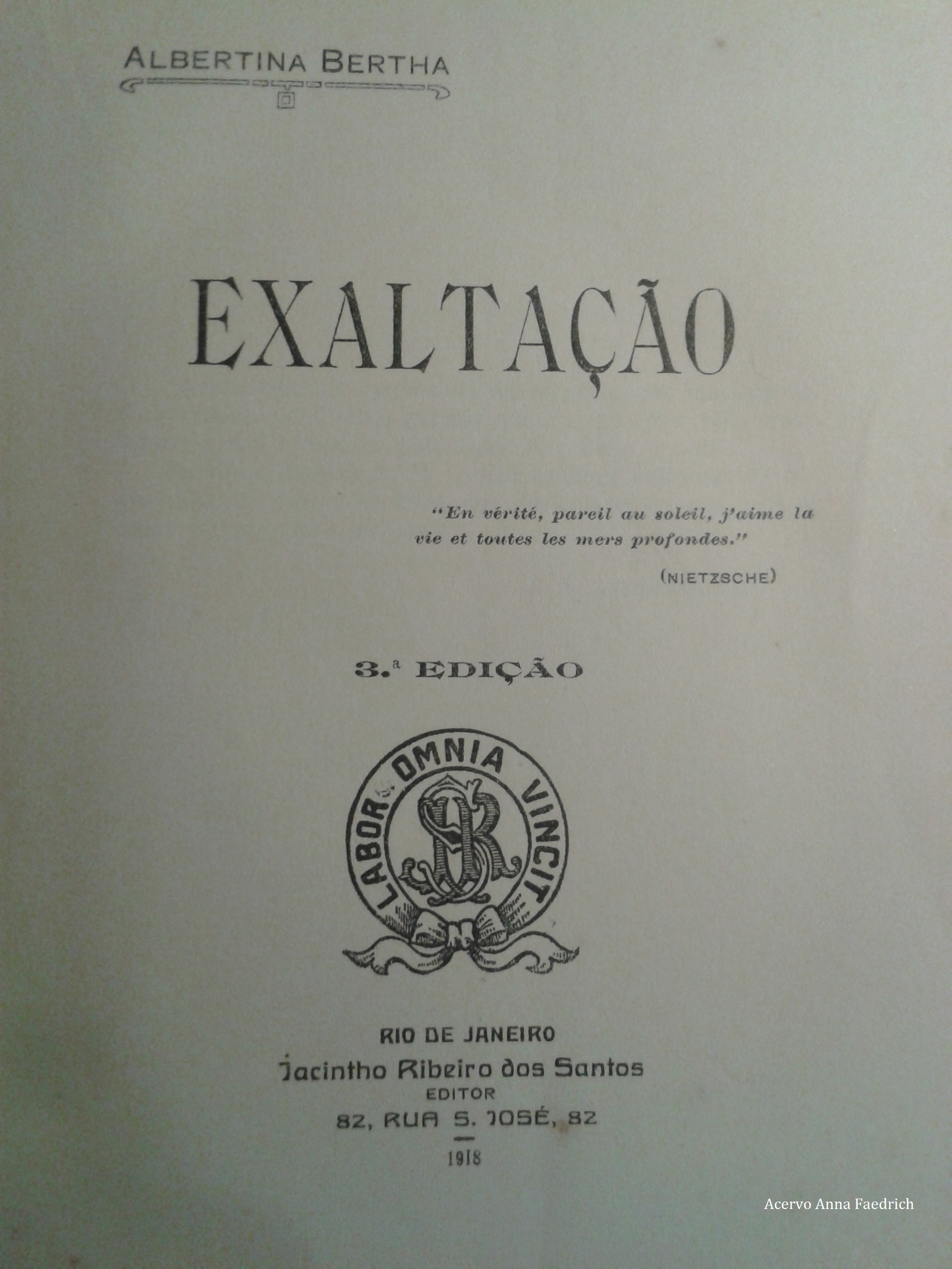 Folha de rosto do romance Exaltação, de Albertina Bertha, 3 ed.